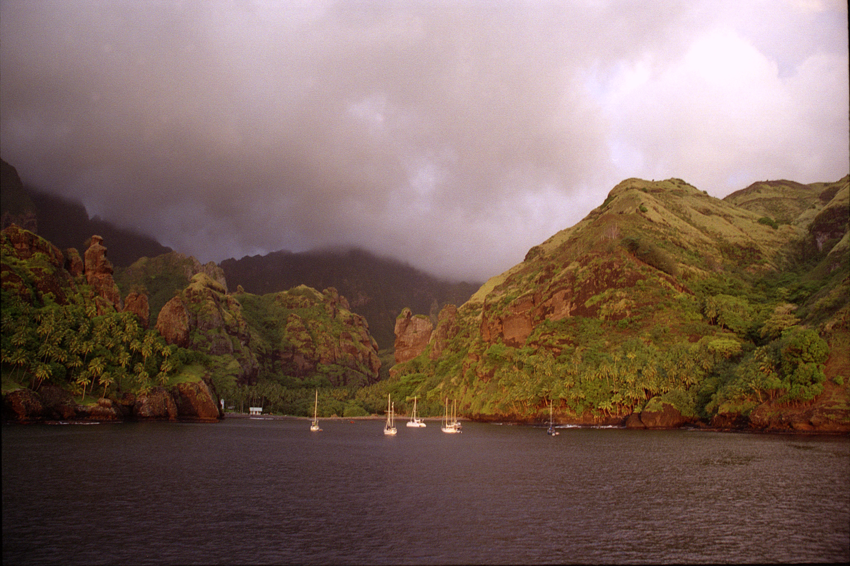 polynésie, iles marquises, baie des vierges